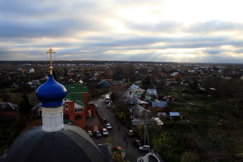 Вид с Колокольни на село Кудиново (Храм Покрова Пресвятой Богородицы).